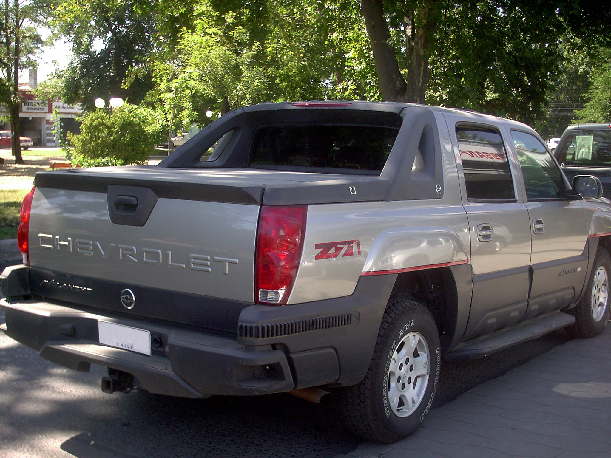 Chevrolet Avalanche Z71 2004